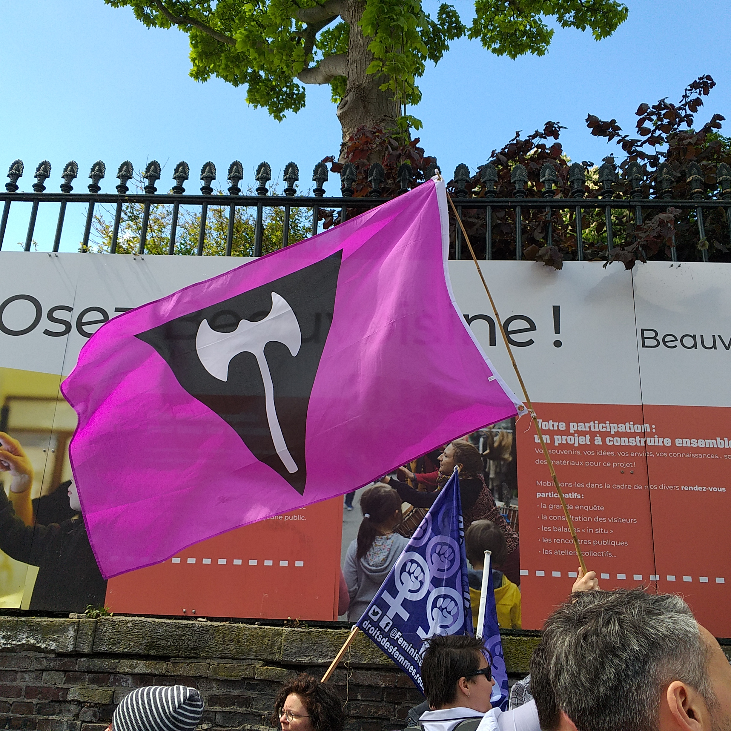 Marche des fiertés rouen 20190504 - drapeau lesbien